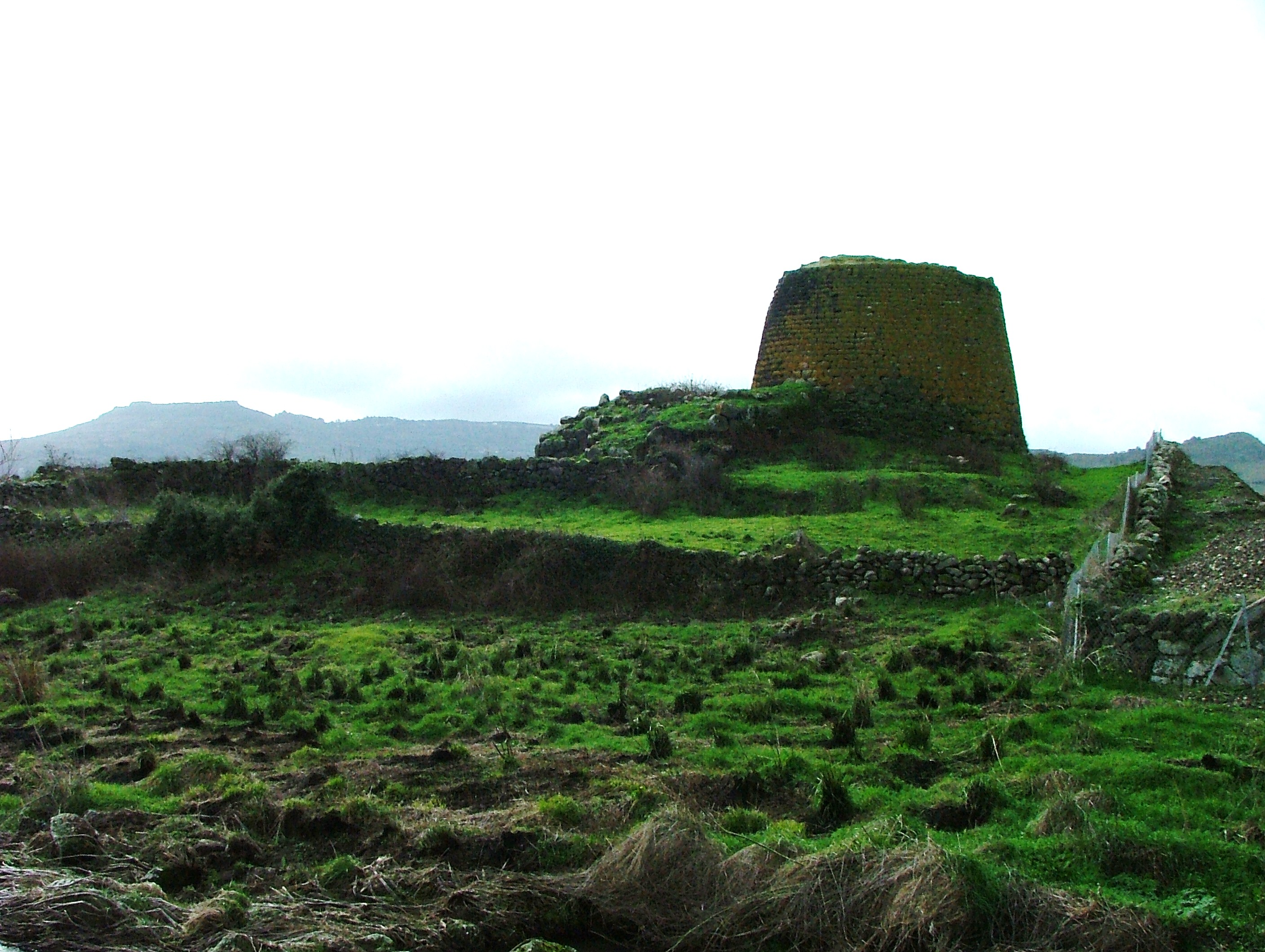 Foto del nuraghe OES realizzata da pittore Giovanni Seu, il nuraghe si trova Nelle Valle dei Nuraghi in agro di Giave, in prossimità delle Stazione di Torralba